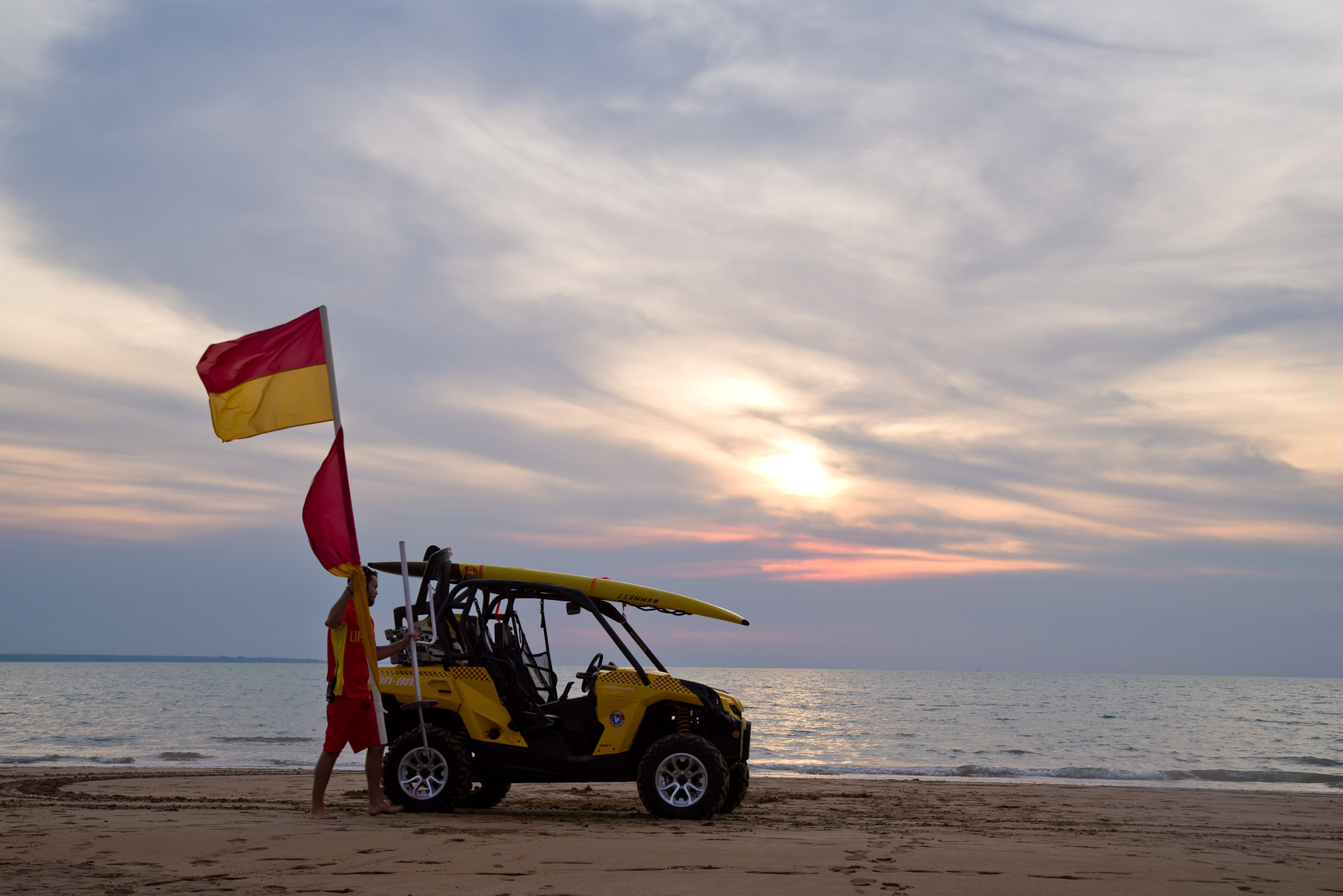 Mindil Beach Sunset markets